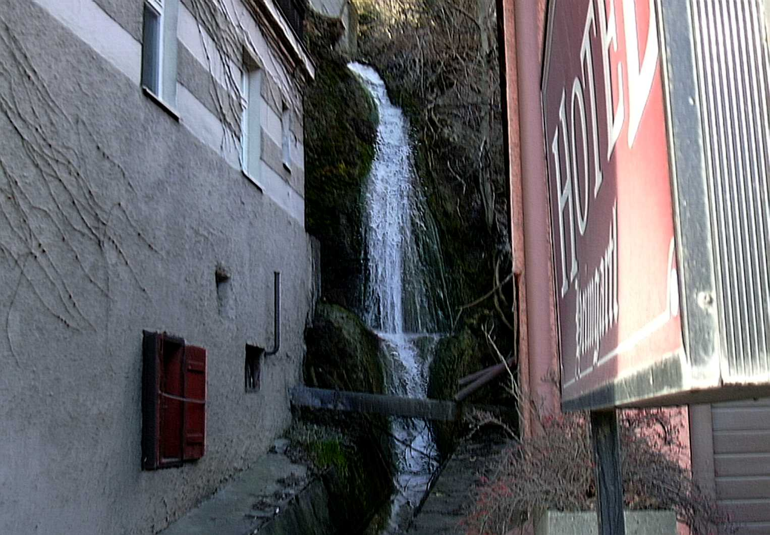 Weissbach Fall